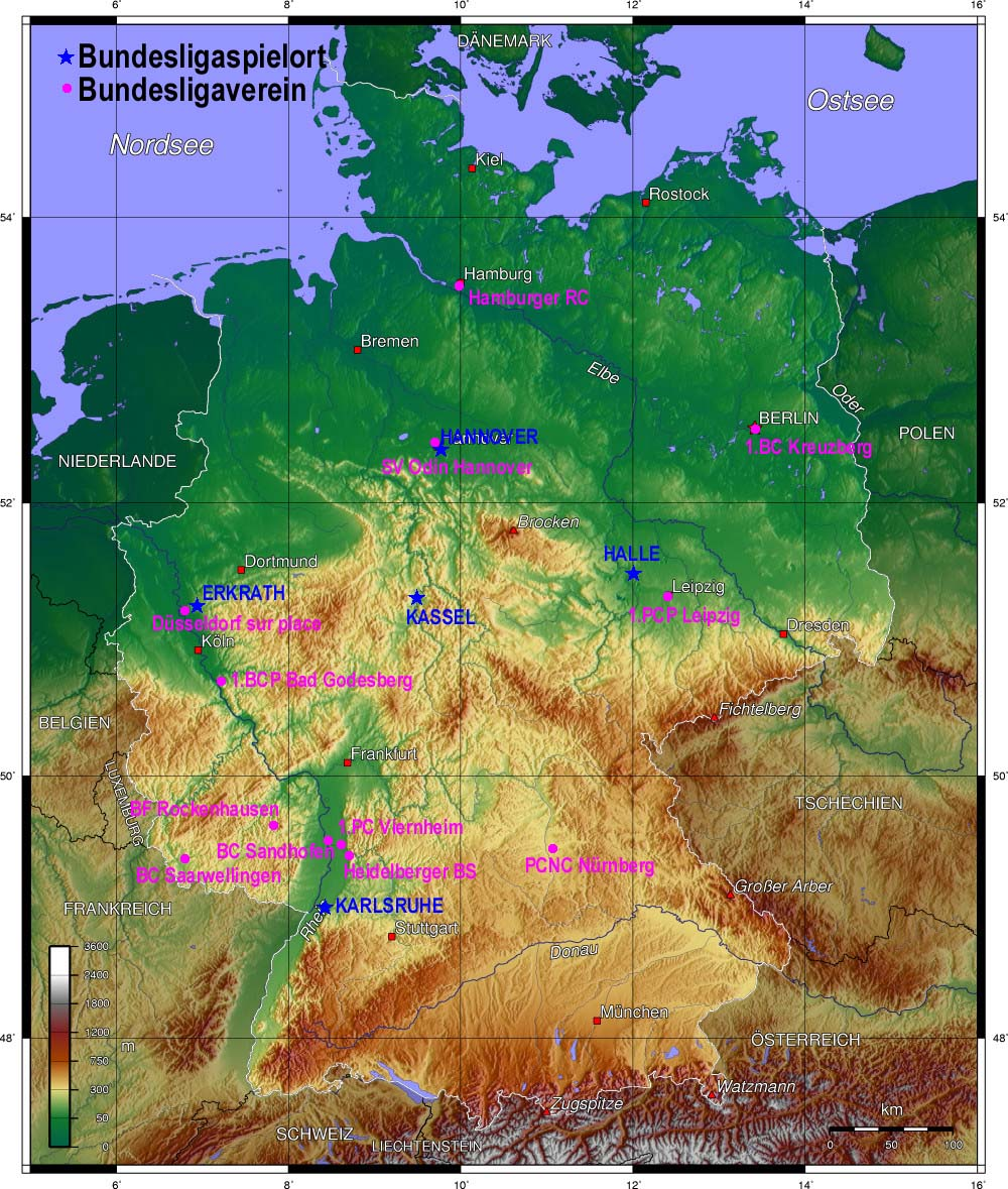 Quelle:DPV-Website Freigabe GFDL: Ticket#: 2006111710003577